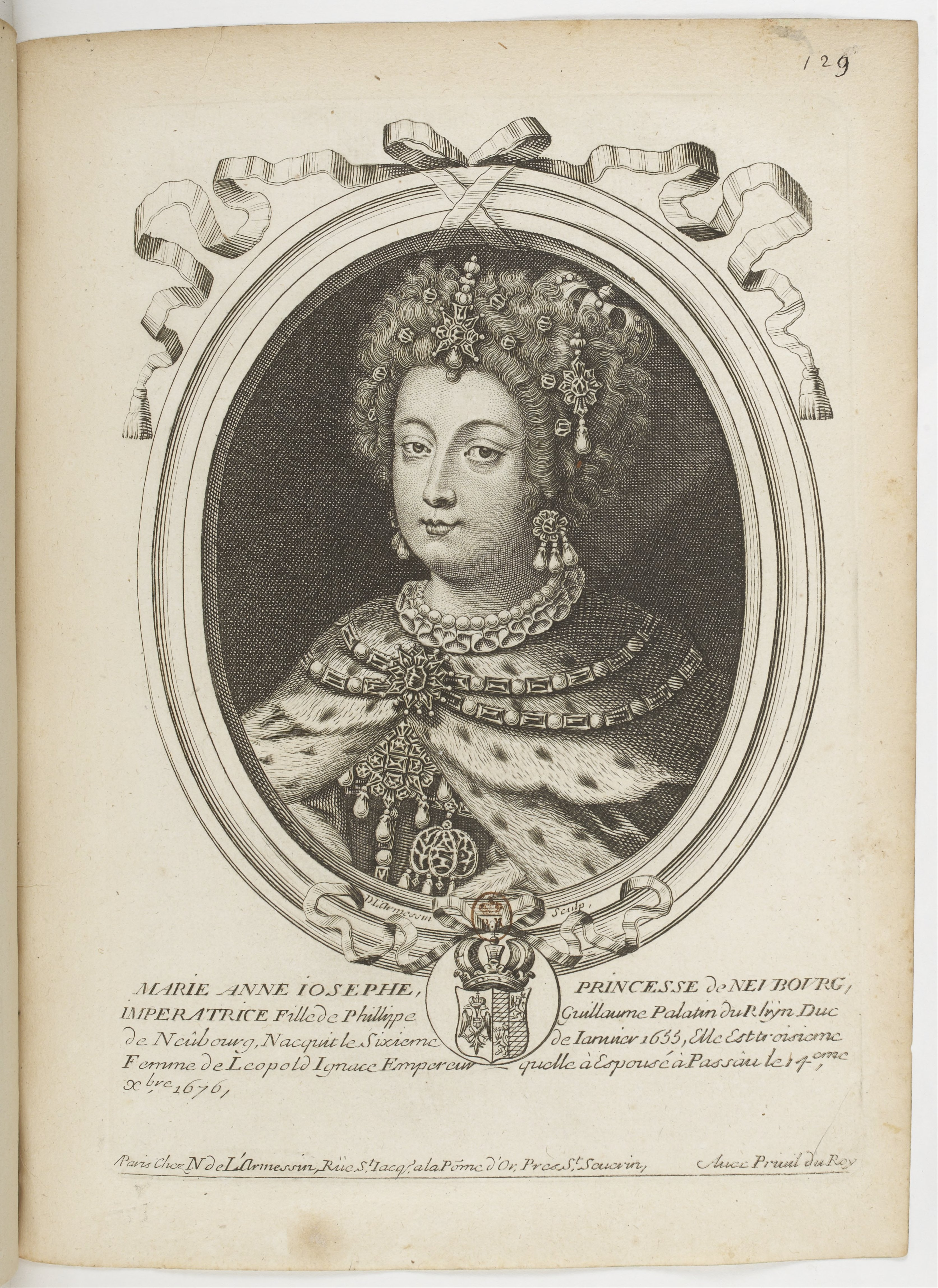 Les augustes représentations de tous les rois de France, depuis Pharamond jusqu'à Louis XIV,... avec un abrégé historique sous chacun, contenant leurs naissances, inclinations et actions plus remarquables pendant leurs règnes